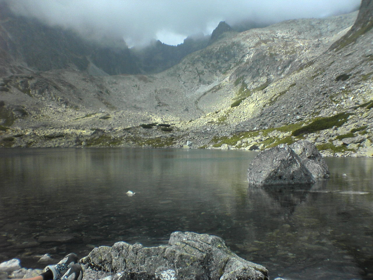 Batizovské pleso3